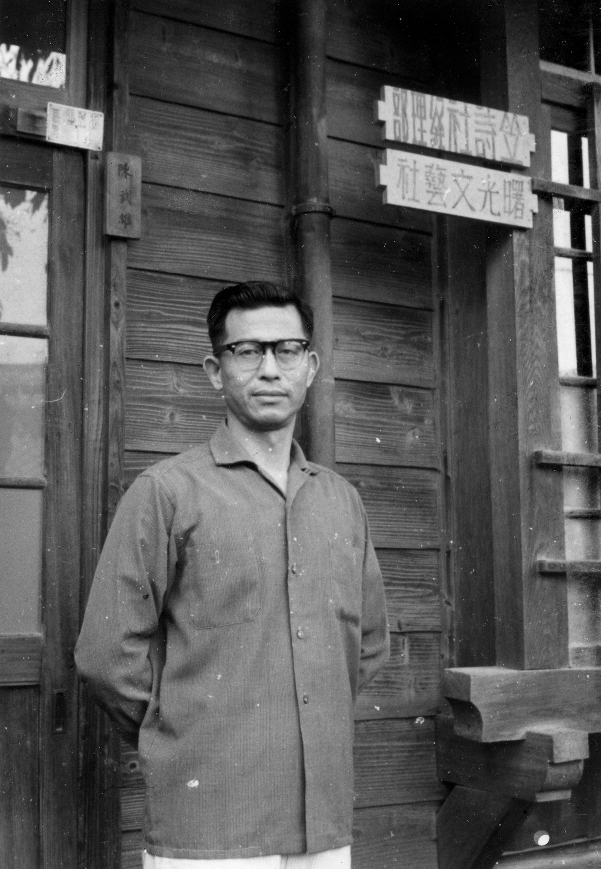 中文（台灣）: 笠詩刊社經理陳千武